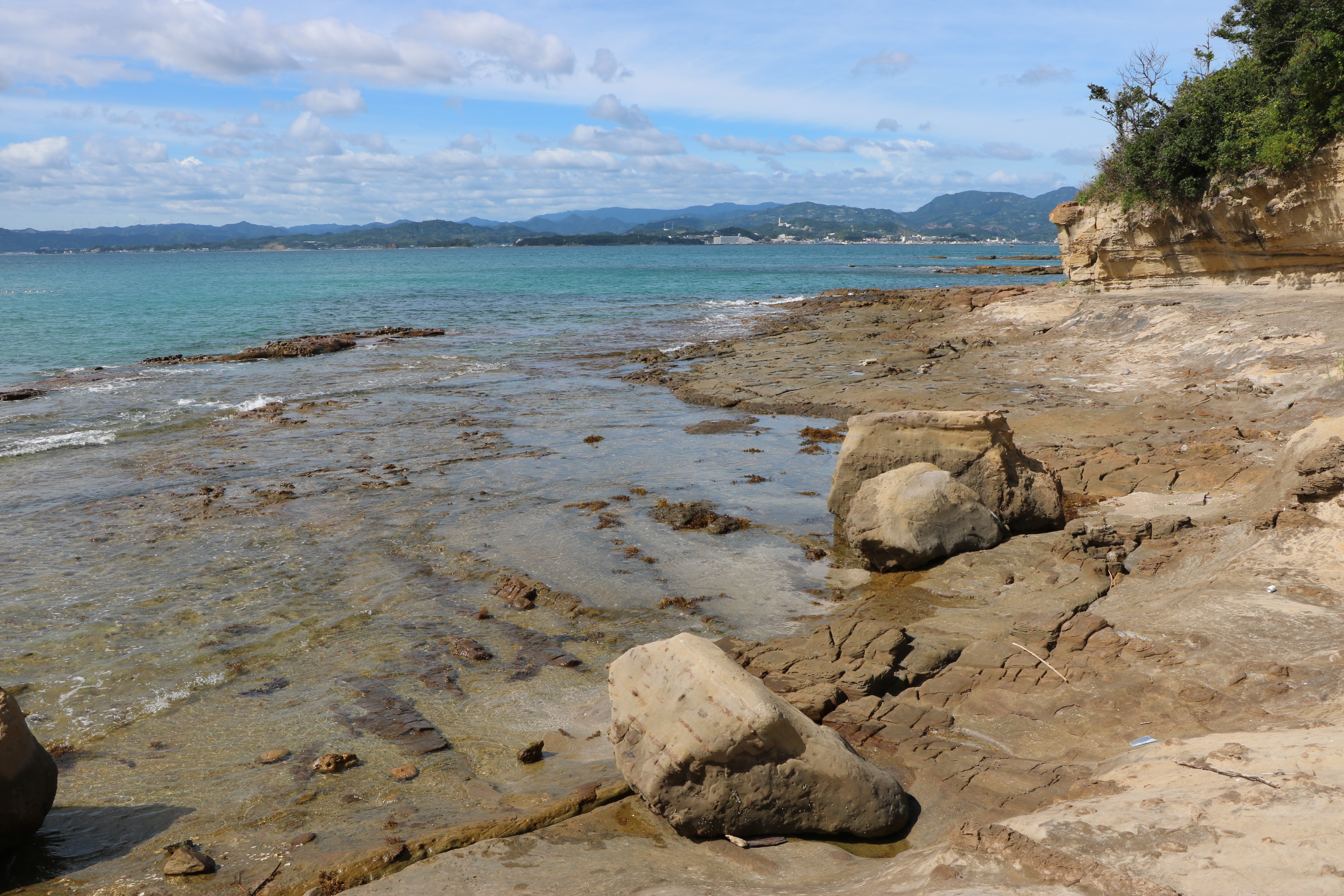 白浜の漣痕（国指定天然記念物、和歌山県西牟婁郡白浜町）